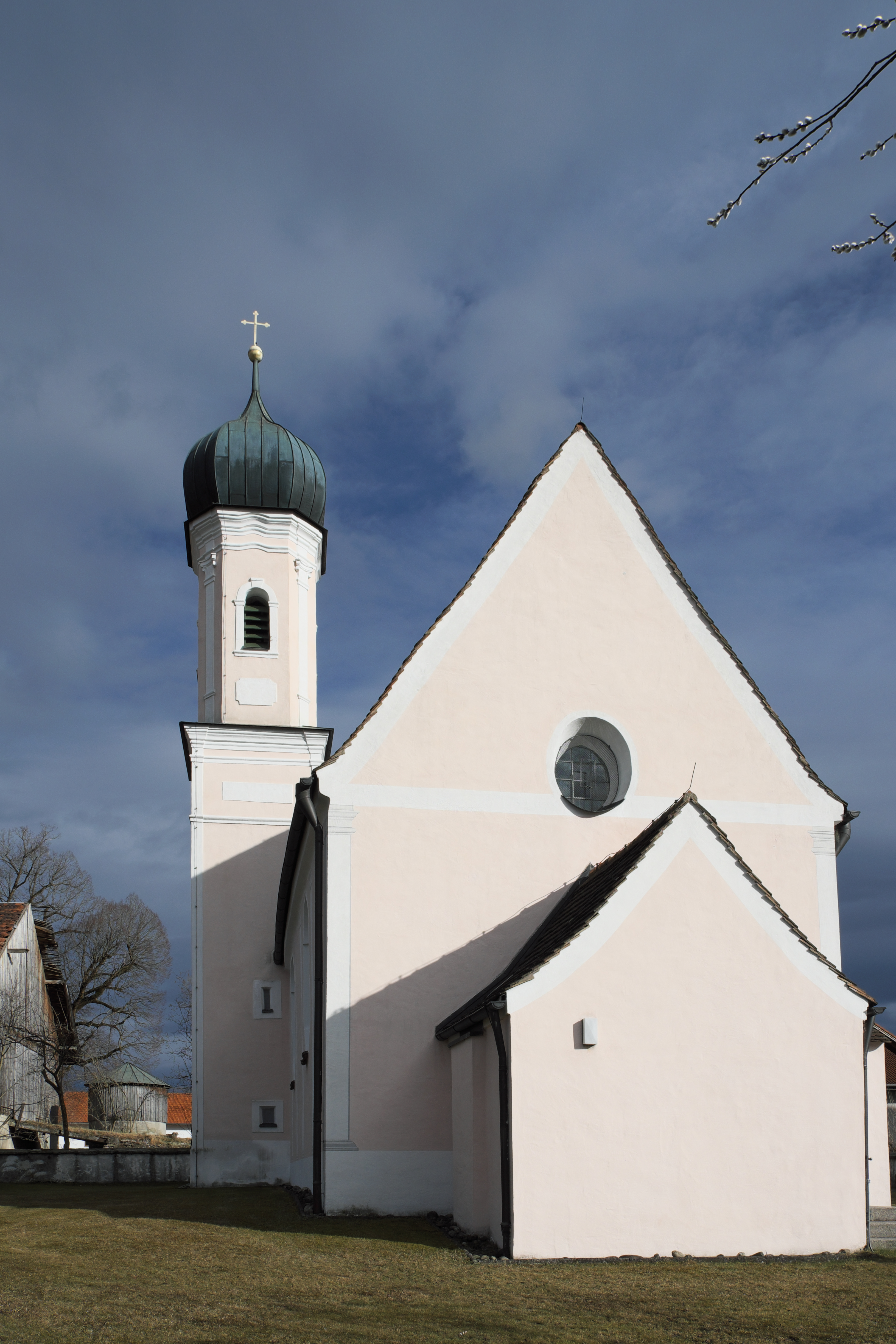 Katholische Filialkirche St. Johannes der Täufer in Deutenhausen (Weilheim in Oberbayern) im Landkreis Weilheim-Schongau (Bayern/Deutschland)